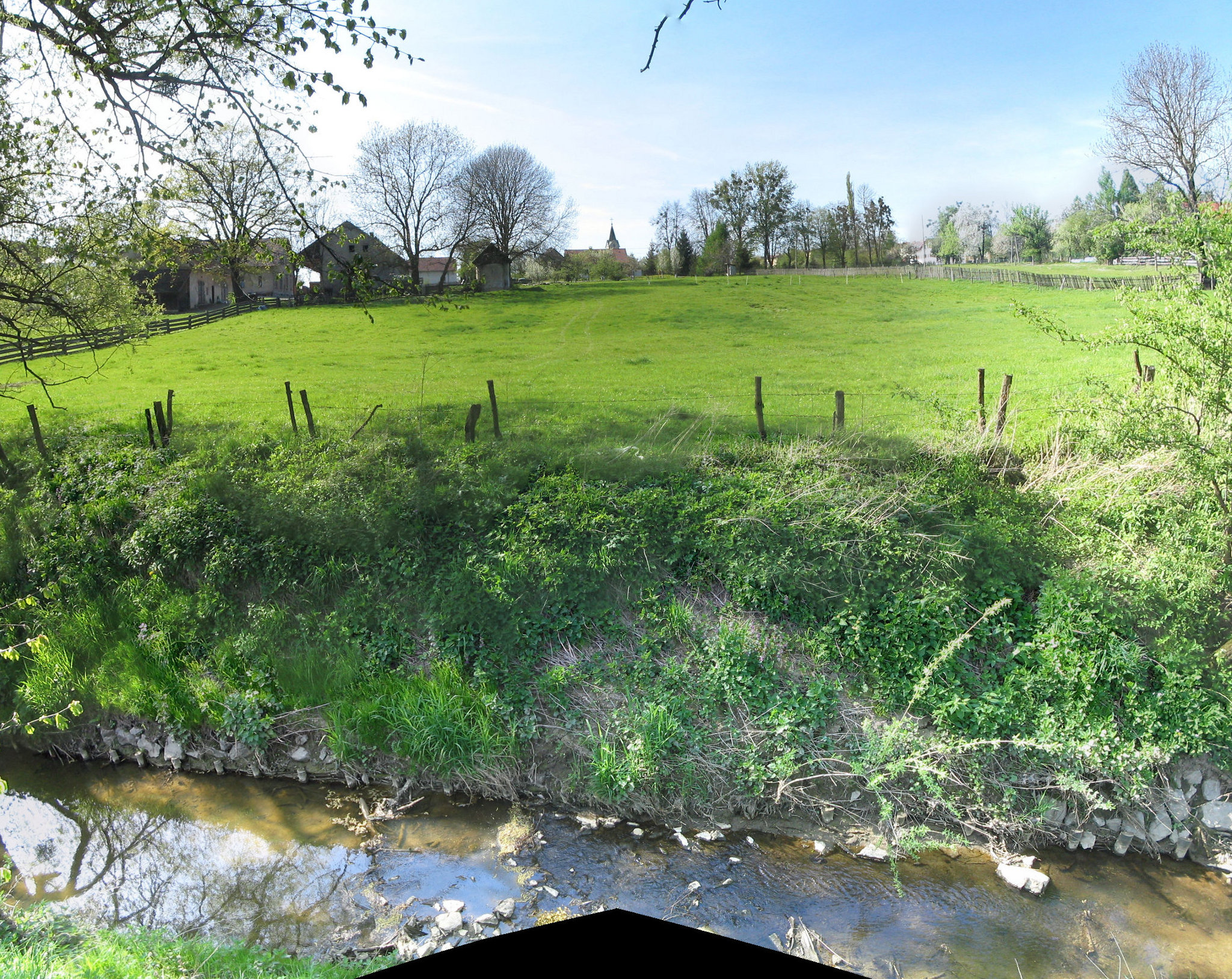 Knajka w Dębowcu